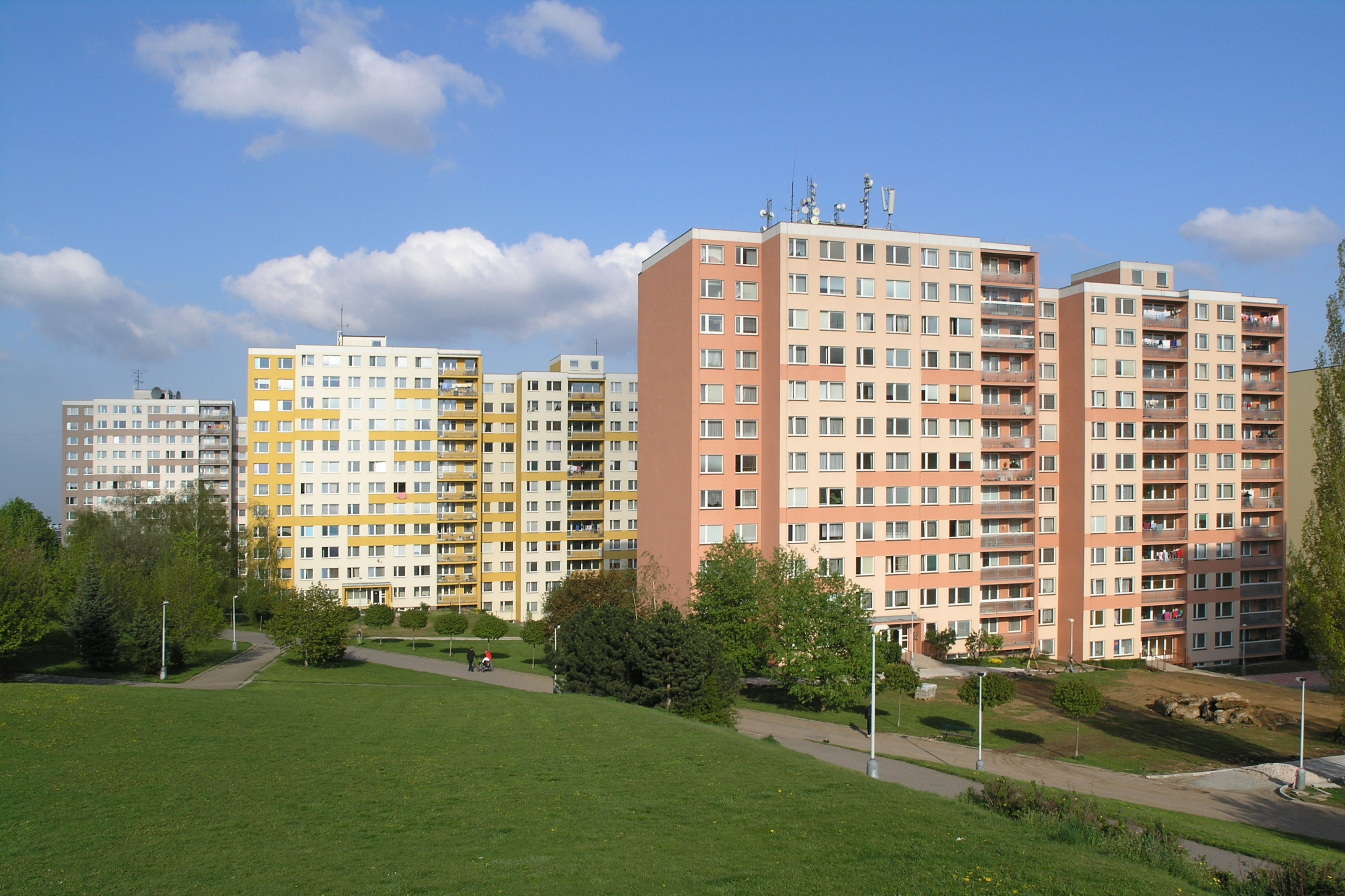 Sídliště Na Dědině, Praha 6-Ruzyně